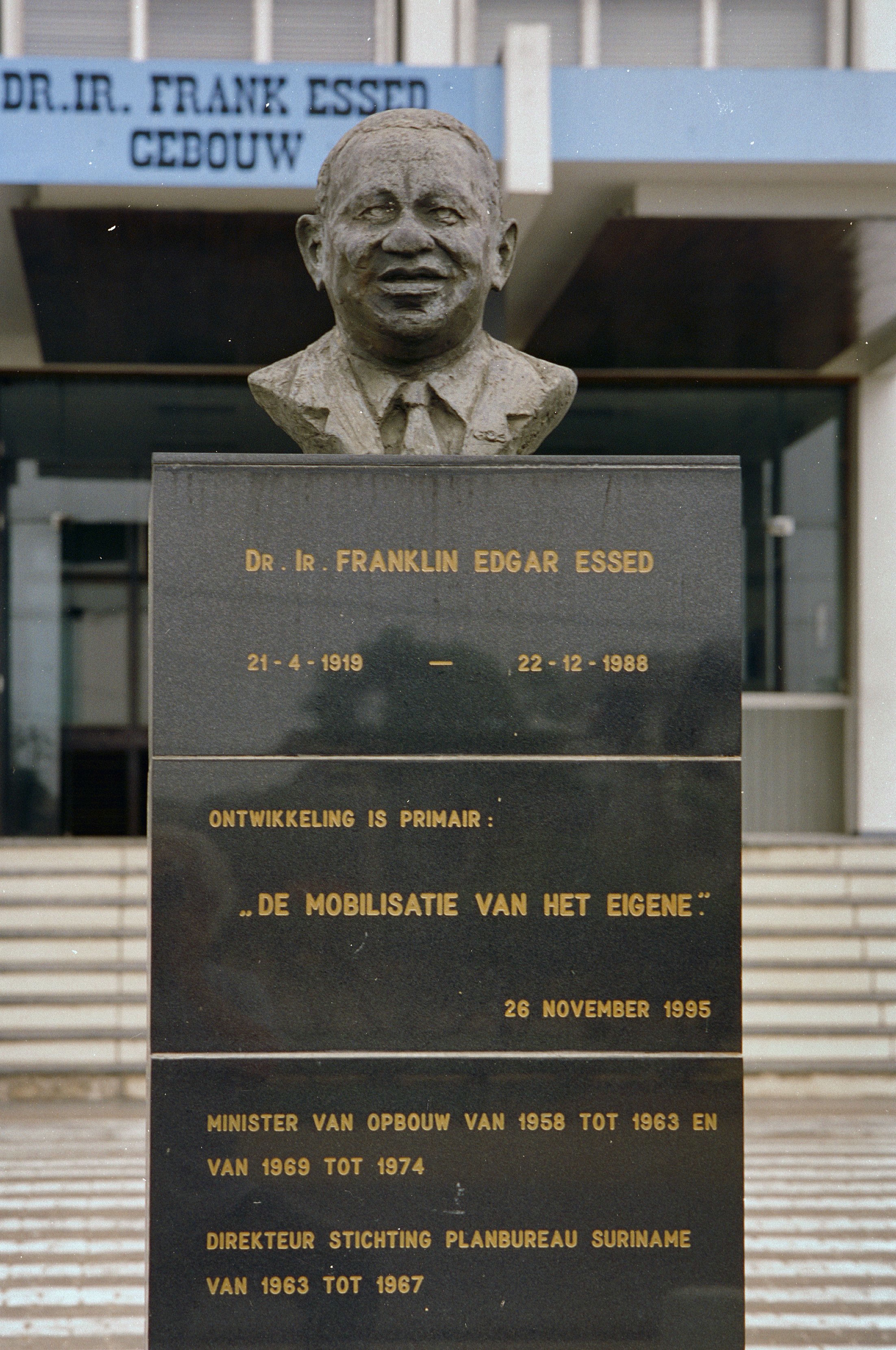 Koloniale geschiedenis/ Borstbeeld: Borstbeeld van Dr. Ir. Franklin Edgar Essed (opmerking: Suriname reis Loek Tangel)